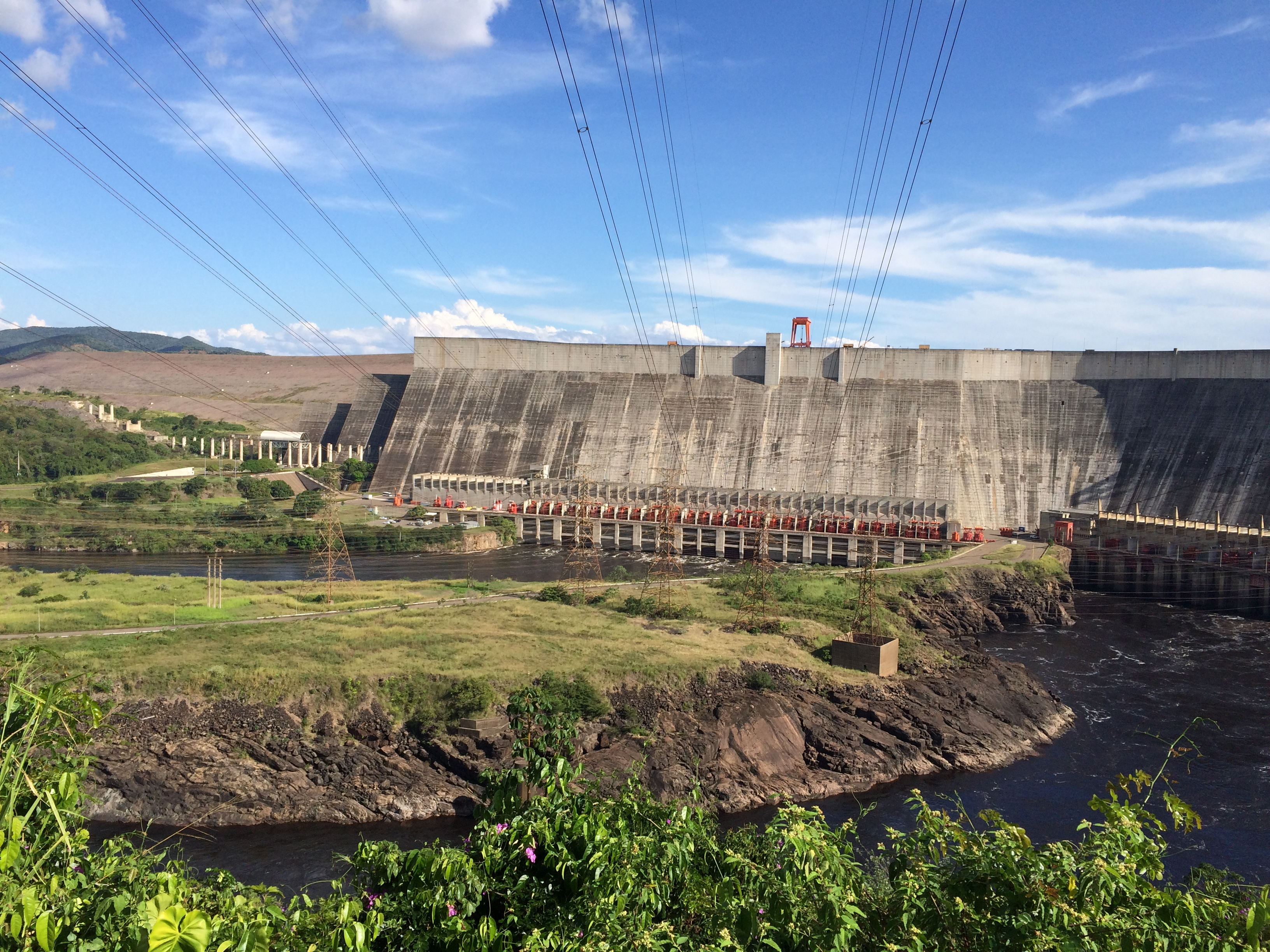 Vista externa de la Central Hidroeléctrica Simón Bolívar- Represa de Guri 14